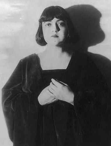 American opera singer Rosa Ponselle (1897-1981)